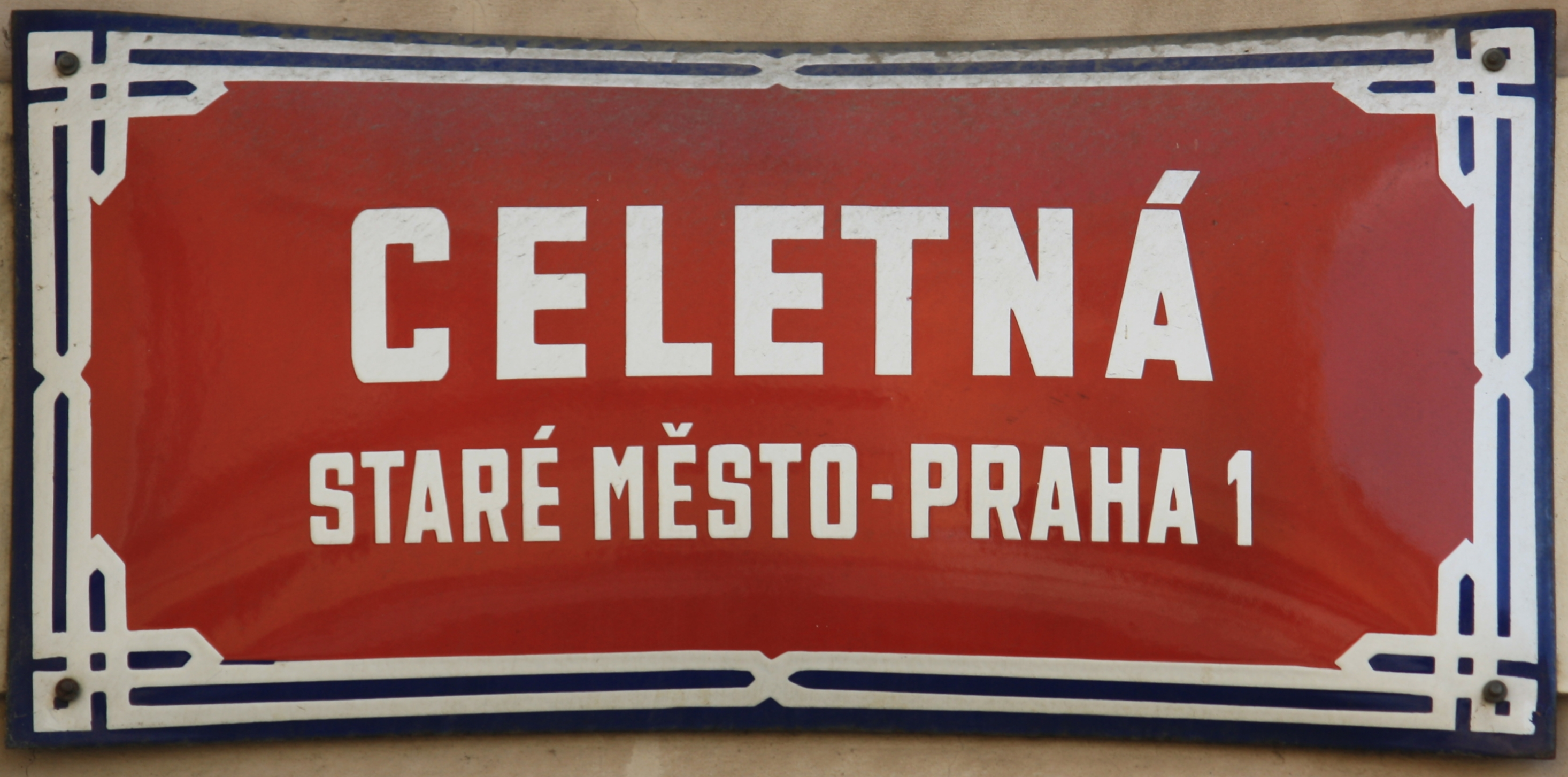 Praha, Staré Město - Celetná